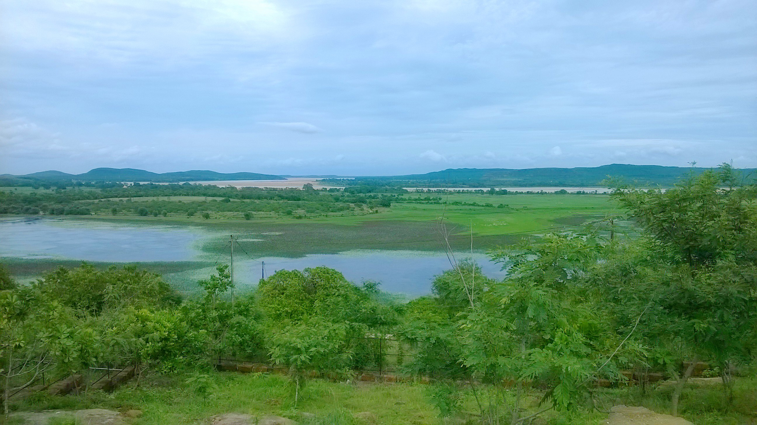 ଓଡ଼ିଆ: ଅଂଶୁପା ହ୍ରଦ କଟକ ଜିଲ୍ଲାର ବାଙ୍କୀରେ ଅବସ୍ଥିତ ଏକ ମଧୁର ଜଳ ହ୍ରଦ ।